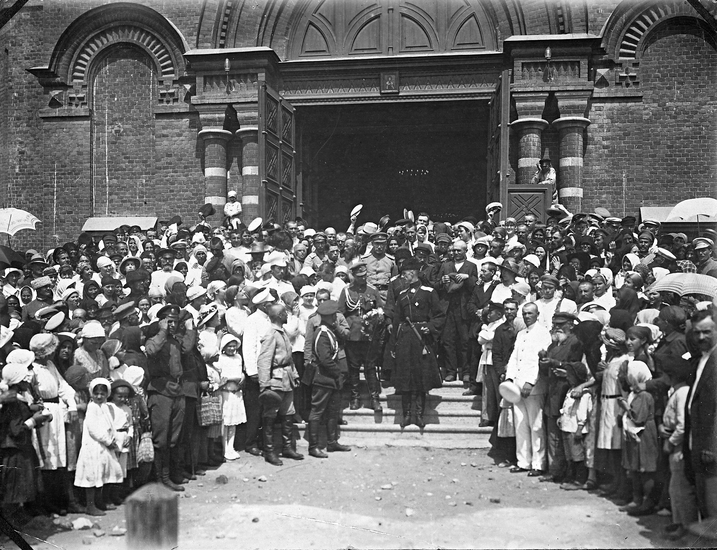 Генерал П.Н. Врангель выходит после богослужения из Александро-Невского собора. Царицын, 15 октября 1919 г.